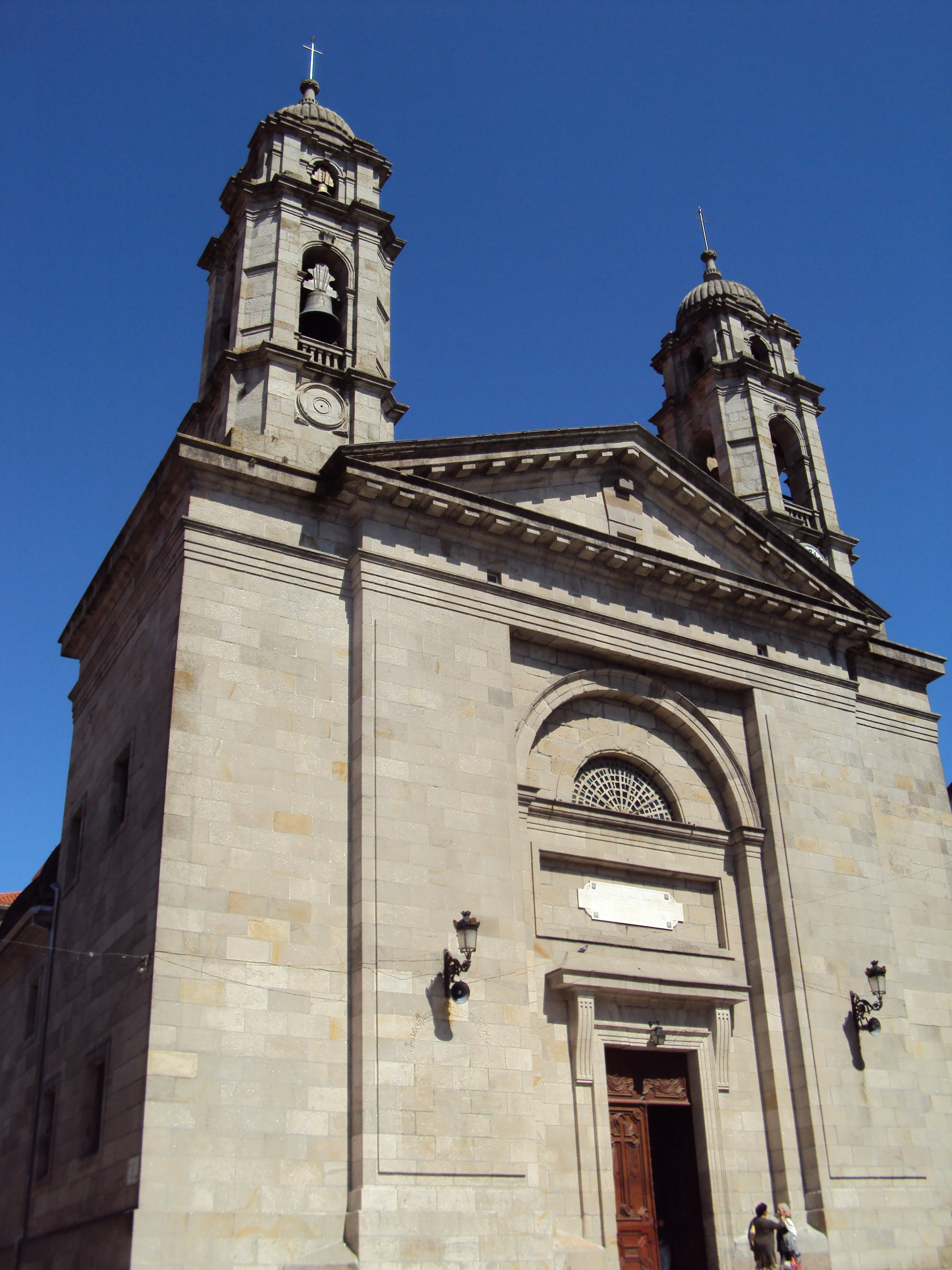 A Concatedral de Santa María de Vigo, antiga Colexiata. Iniciada en 1816 e terminada de construír en 1836, en substitución do templo gótico anterior. De estilo neoclásico, construída conforme ao proxecto do arquitecto Melchor de Prado Mariño, datado en 1811. Alberga no seu interior o soado Cristo da Vitoria que, segundo a tradición, favoreceu aos vigueses nas Guerras Napoleónicas. Cada primeiro domingo de agosto sae en procesión dentro da maior manifestación relixiosa da cidade.